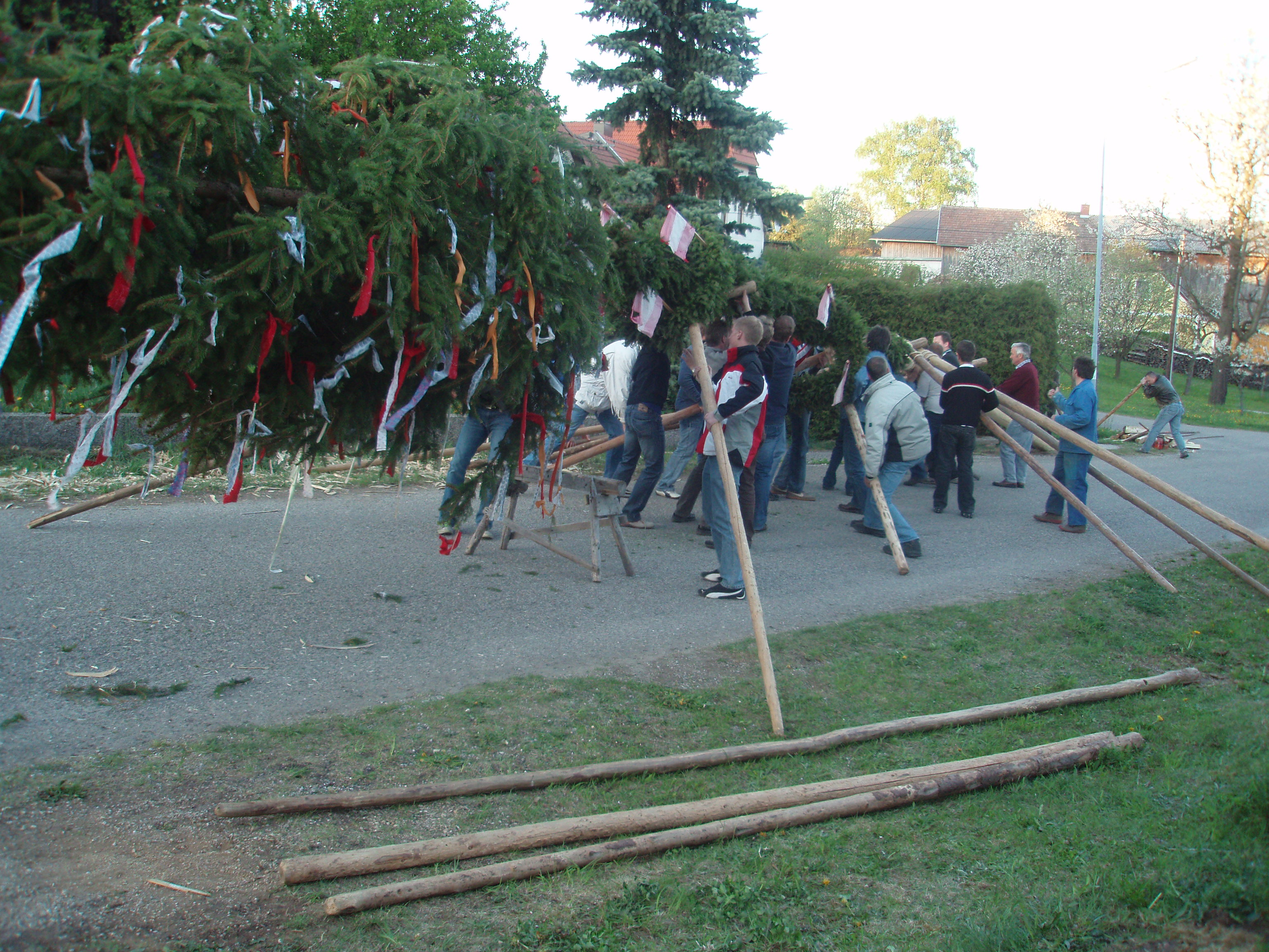 Dorfgemeinschaft Frauendorf beim Aufstellen des Maibaumes